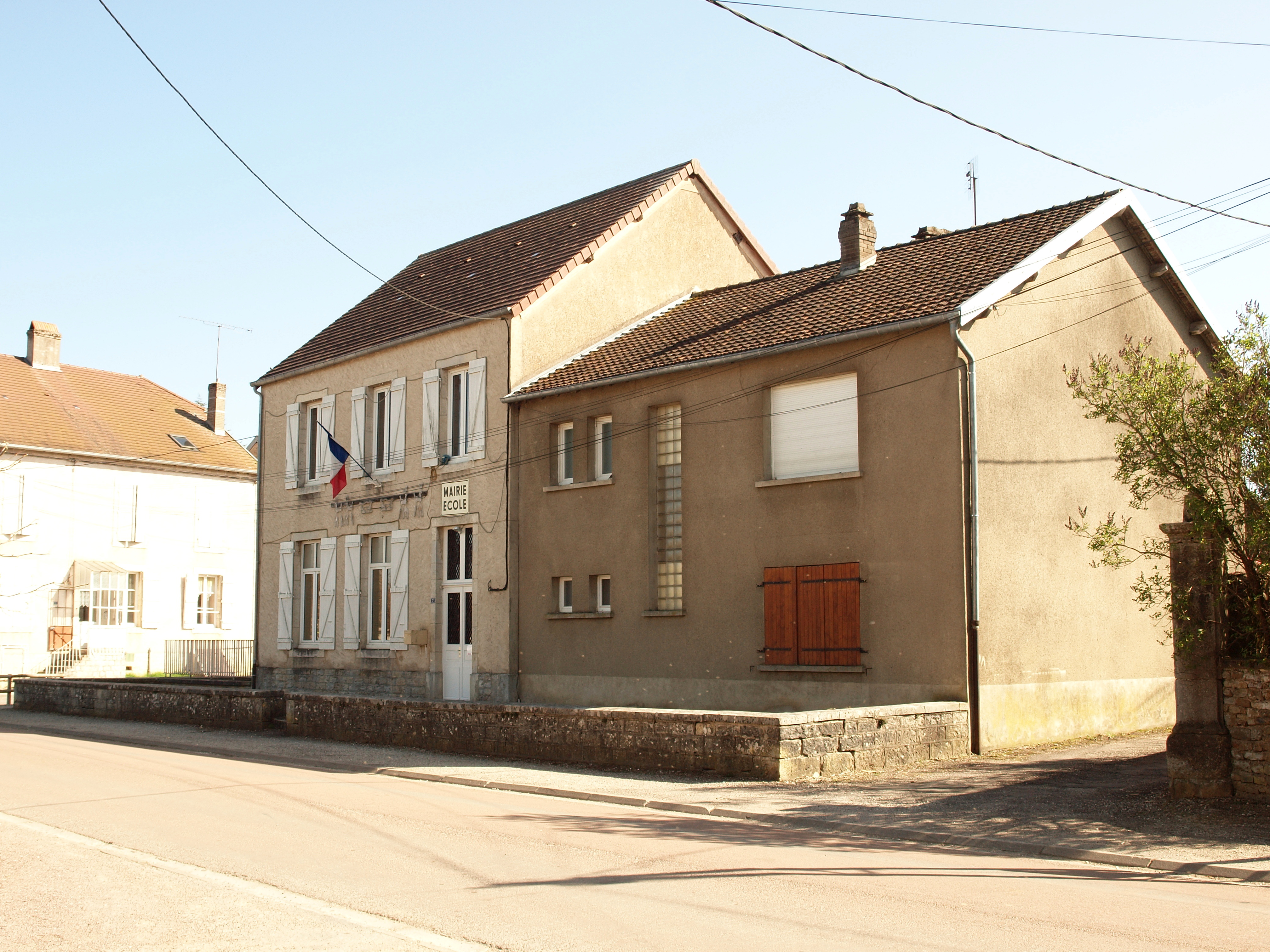 Villegusien-le-Lac (Haute-Marne, France)